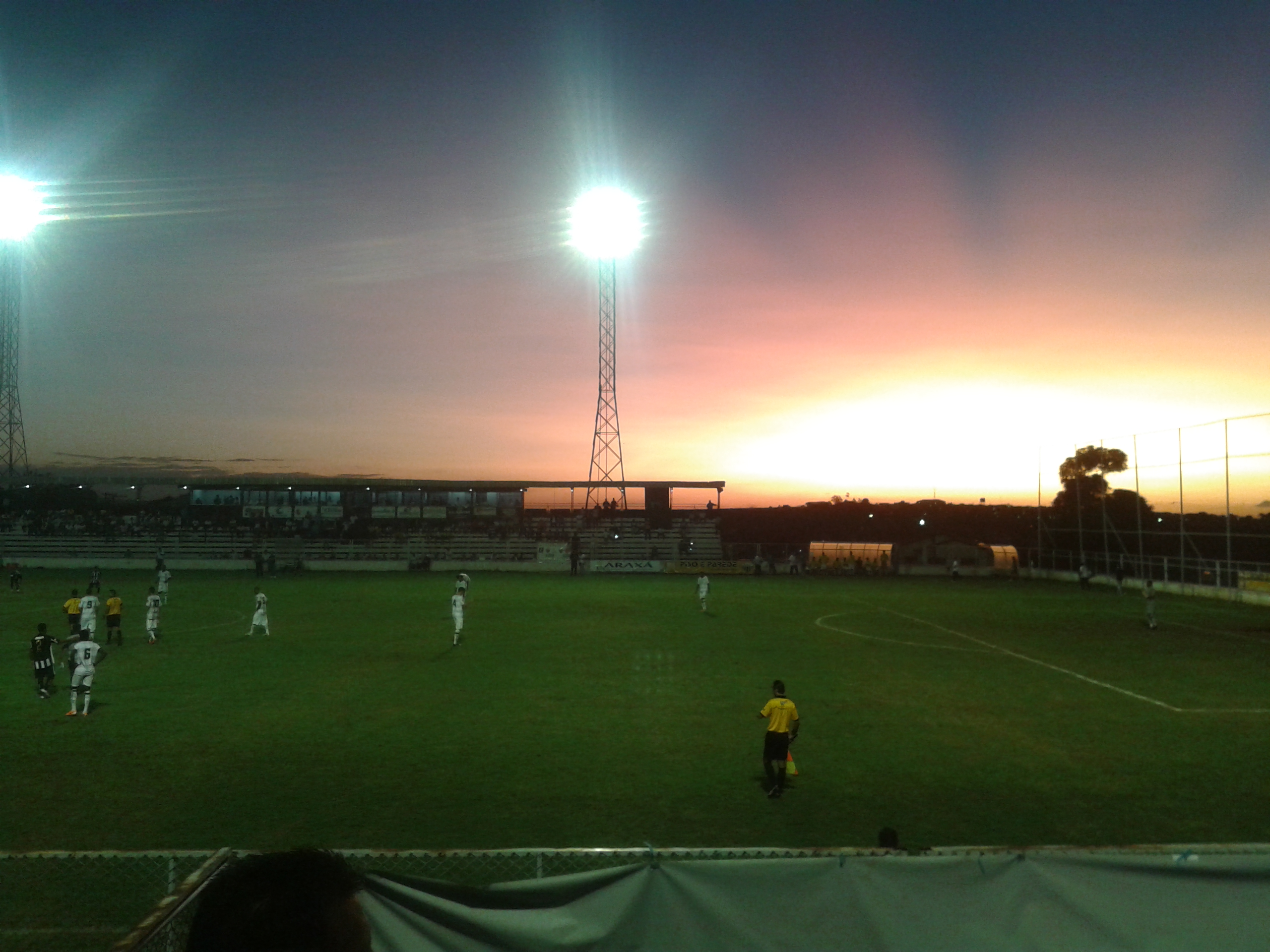 Pôr do Sol no Estádio Fausto Alvim em Araxá, durante a partida entre Uberlândia x Araxá.